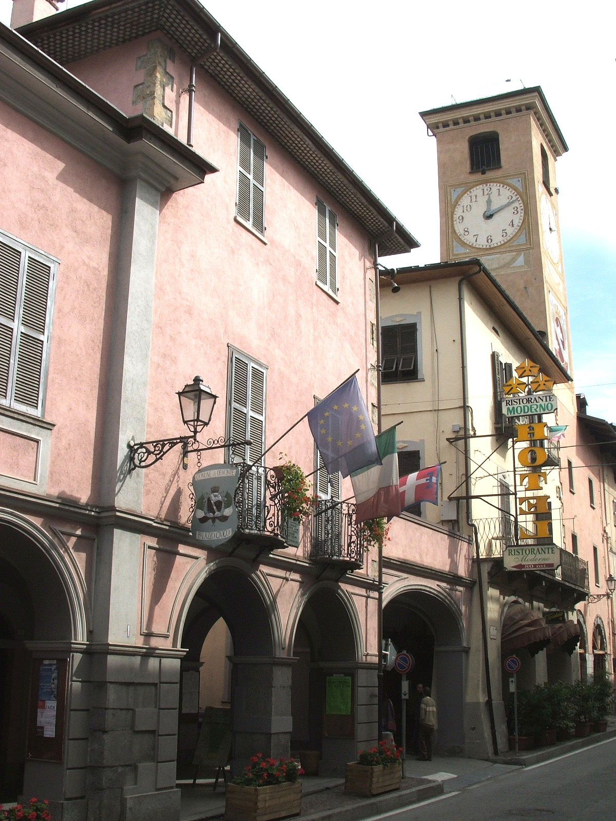 Valle Stura di Demonte - Immagine da Demonte